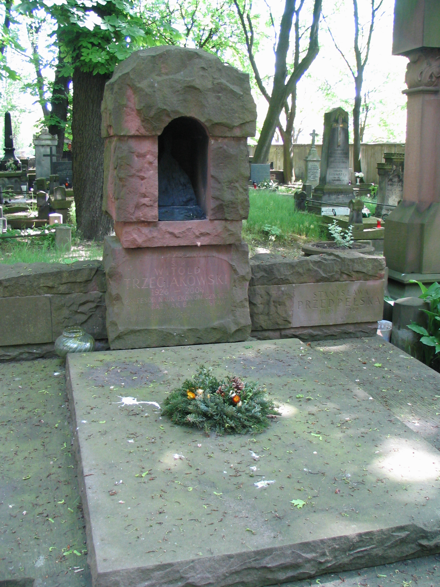 Nagrobek Witolda Trzeciakowskiego na Cmentarzu Powązkowskim, Warszawa, 14 maja 2008. Witold Trzeciakowski.